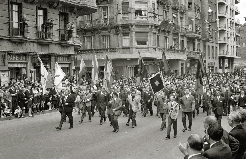 Título original: Representantes de las distintas hermandades de ex-combatientes y desfile militar por las calles de San Sebastián (4/17) Localización: San Sebastián (Guipúzcoa)